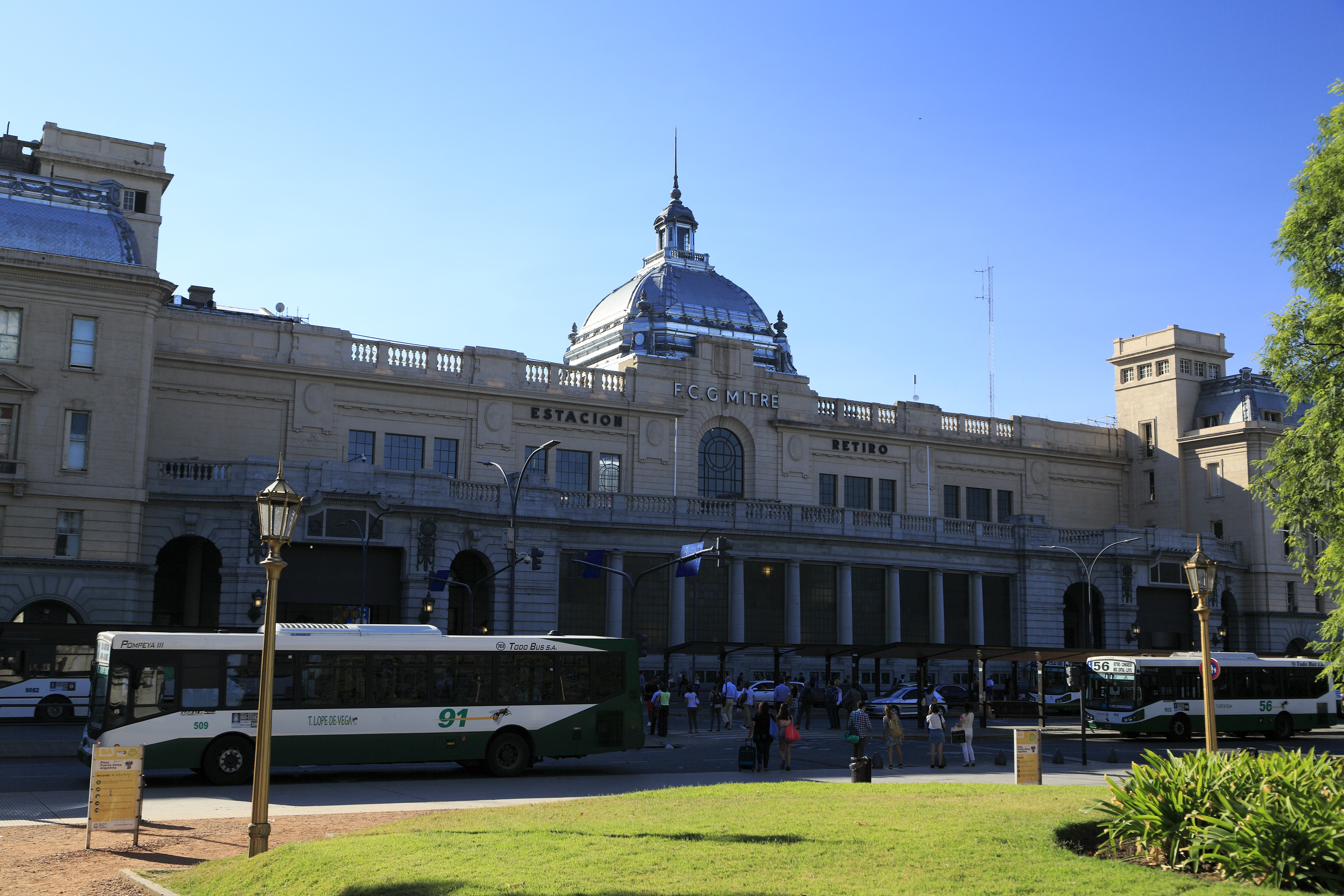 Mittelbau des Empfangsgebäudes, am Nachmittag leider im Schatten. Ein Bild der Gesamtfassade ist schon wegen des starken Kraftverkehrs kaum erzielbar.